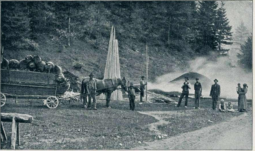 Bohinjski ogljarji.